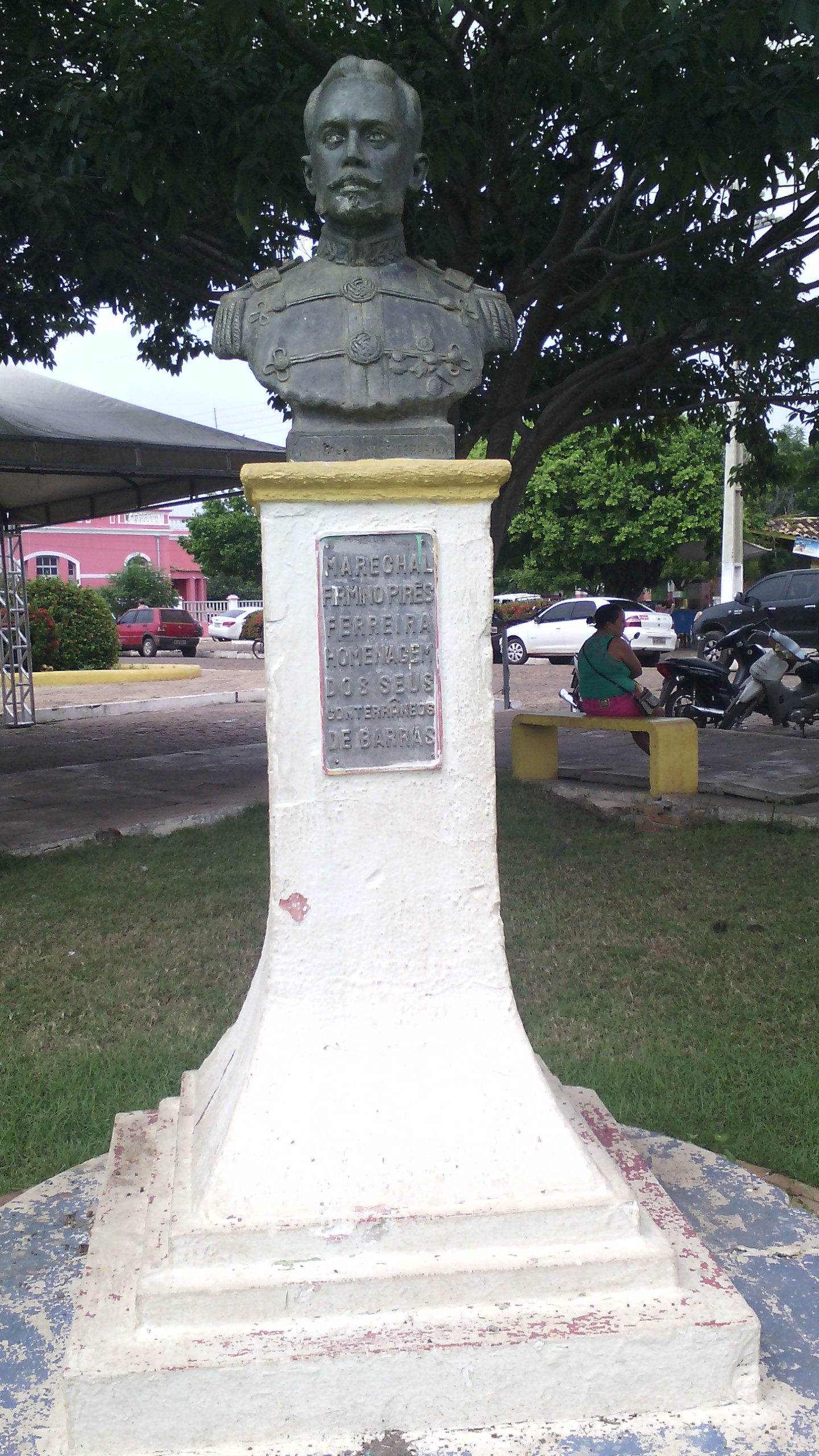 Monumento com o busto de Firmino Pires Ferreira, um militar e politico brasileiro, na Praça da Matriz em Barras Piauí.